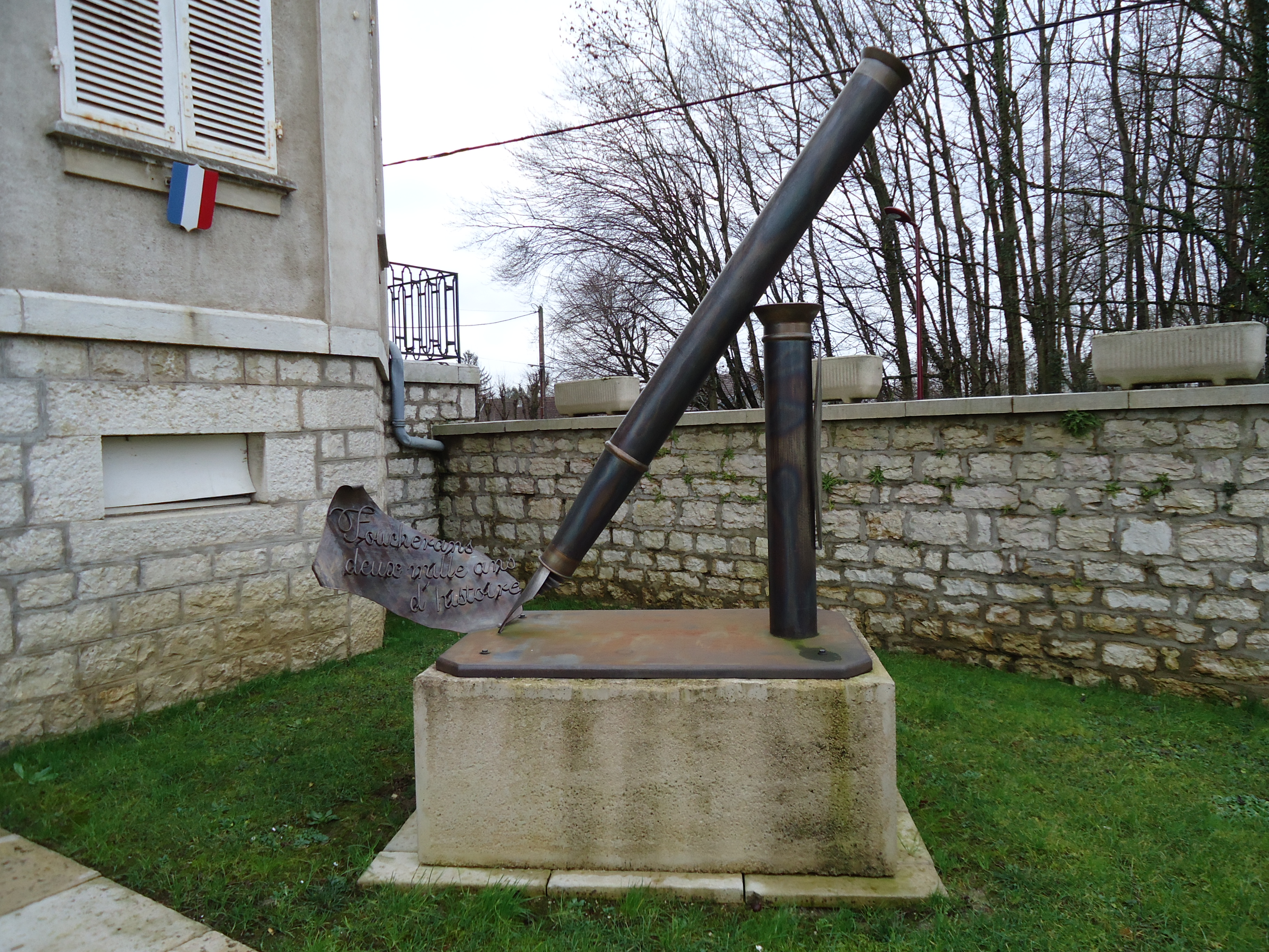 Scuplture à Foucherans